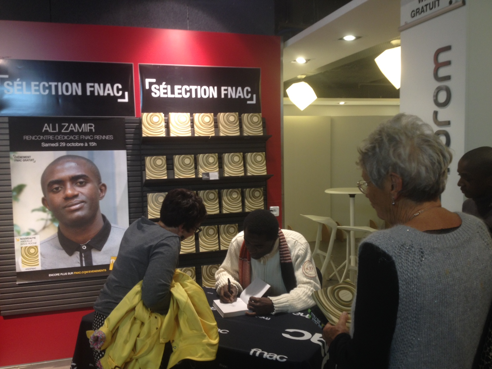 Ali Zamir en pleines dédicaces de son roman à la Fnac de Rennes en 2016